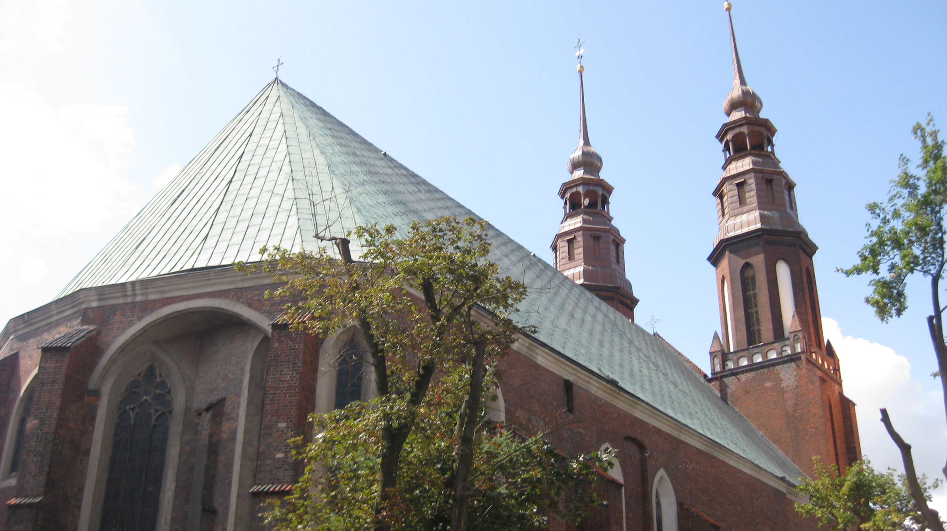 Kathedrale